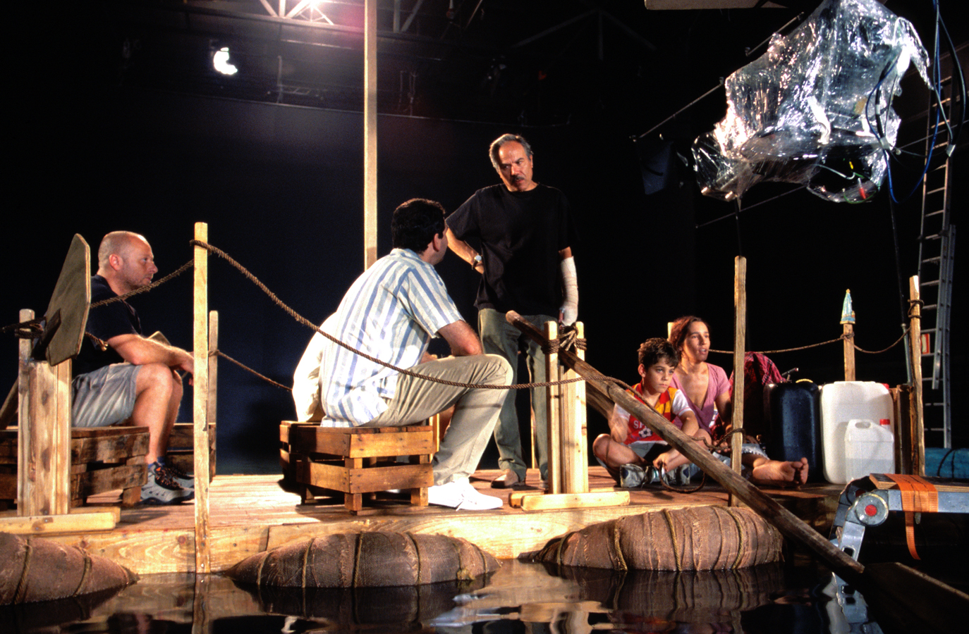 Francisco Rodríguez rodando "90 Millas"